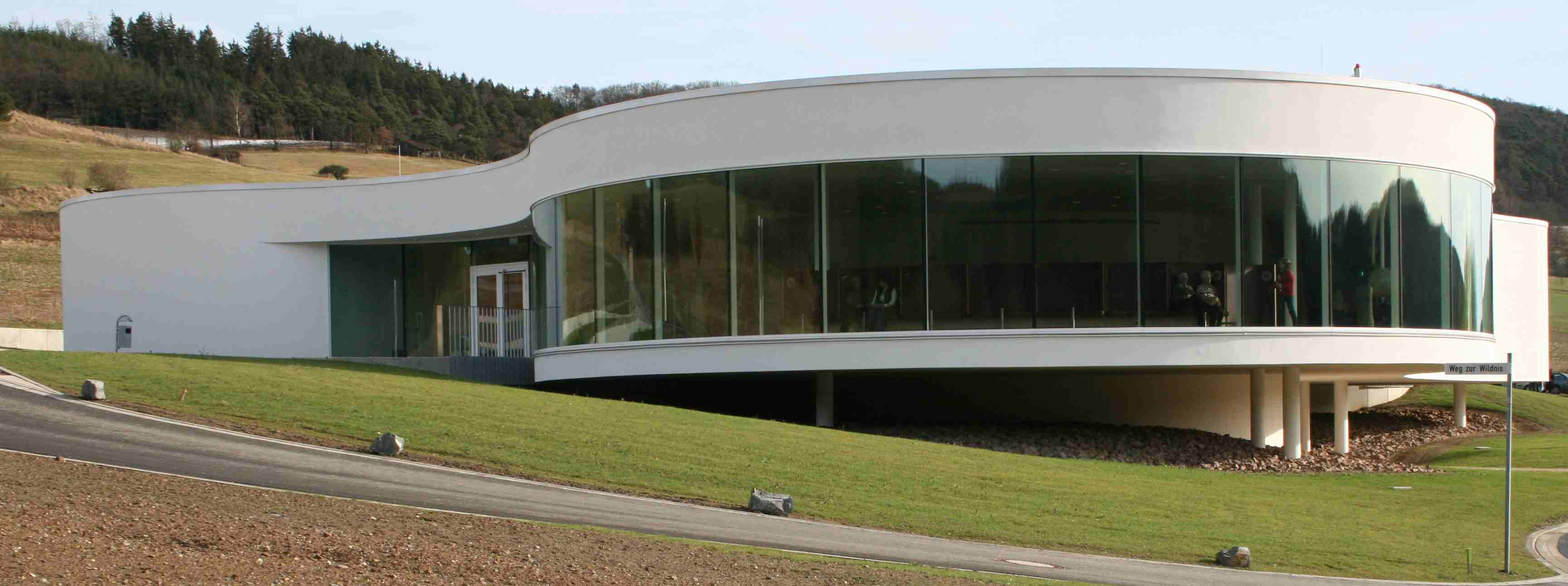 Nationalparkzentrum Kellerwald zwischen Vöhl-Herzhausen und -Kirchlotheim